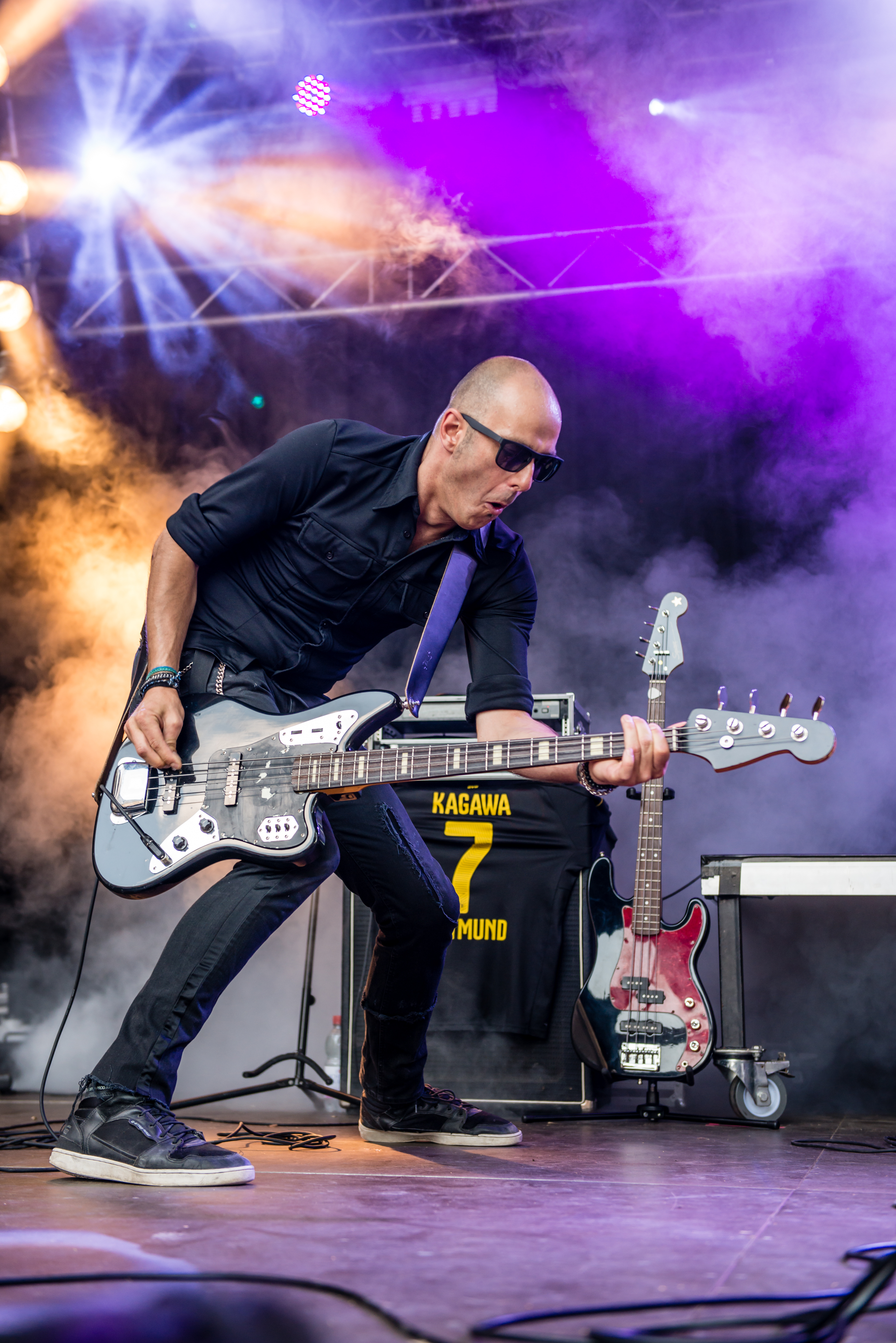 'Castle Rock 2015; Mülheim Schloß Broich': 'Whispers in the Shadow'